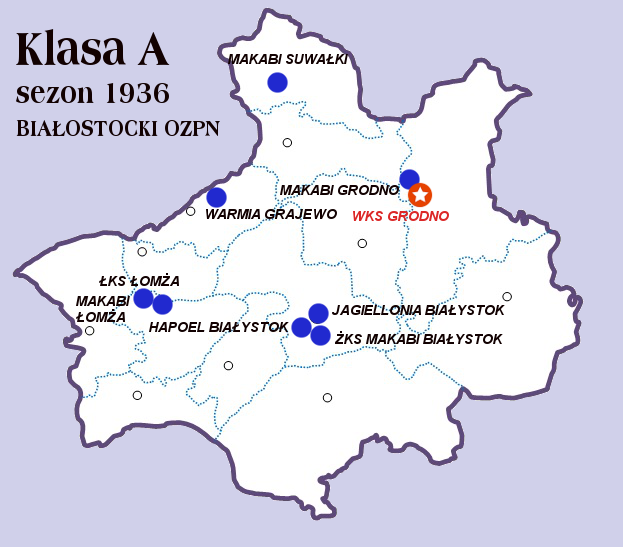 Klasa A Białystok 1936/37